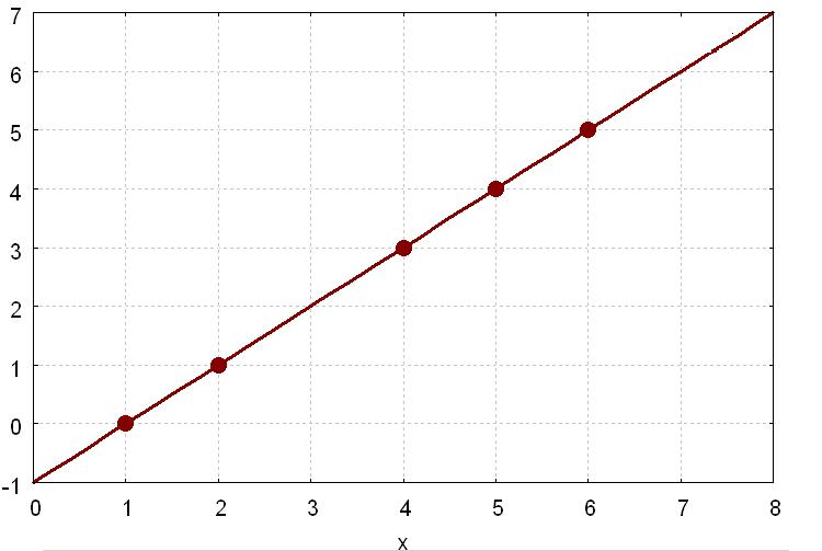 zuzen baten irudia, puntuekin batera